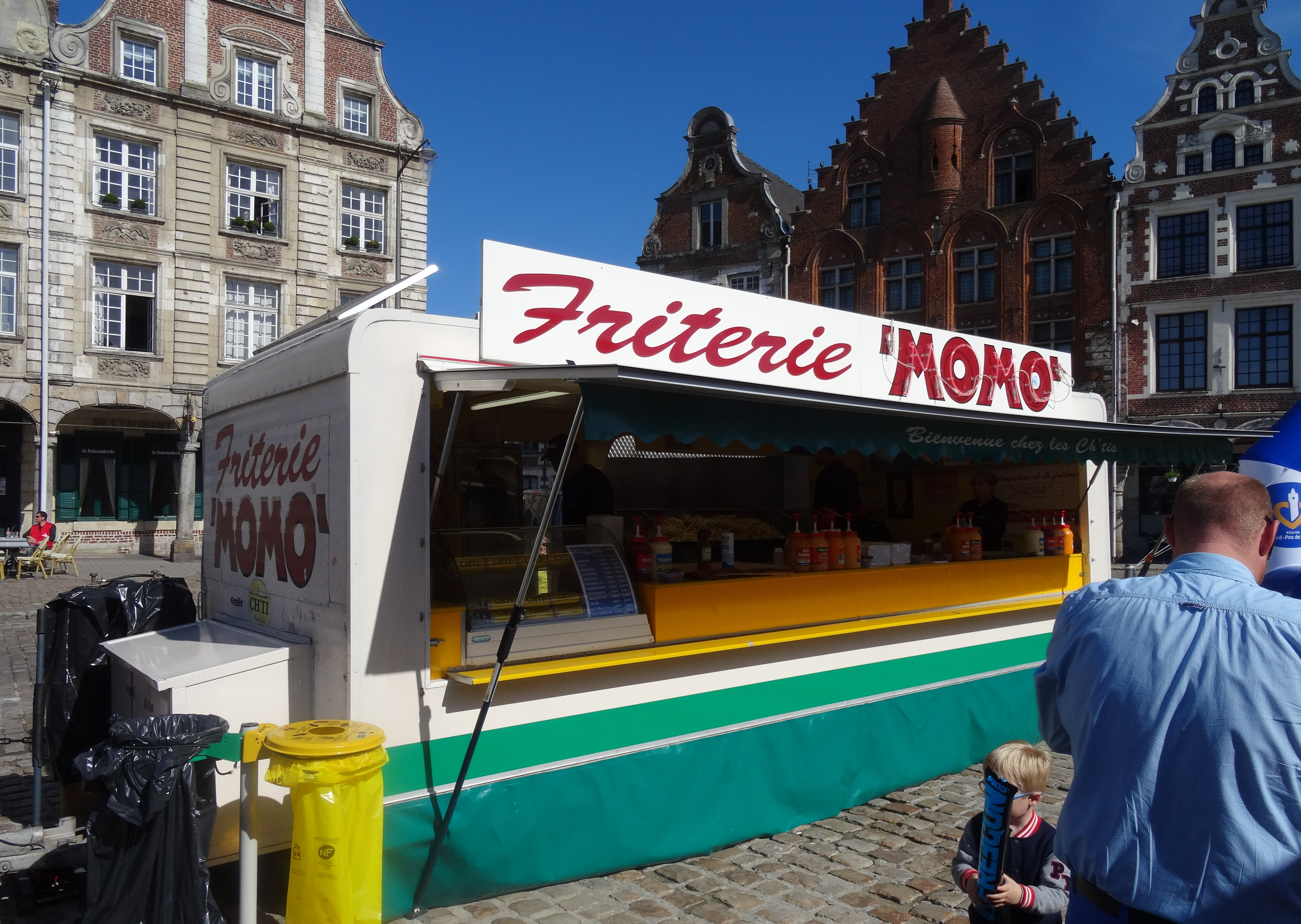 Reportage photographique réalisé le dimanche 25 mai 2014 à l'occasion du départ et de l'arrivée de la troisième étape du Paris-Arras Tour 2014 à Arras, Pas-de-Calais, Nord-Pas-de-Calais, France.